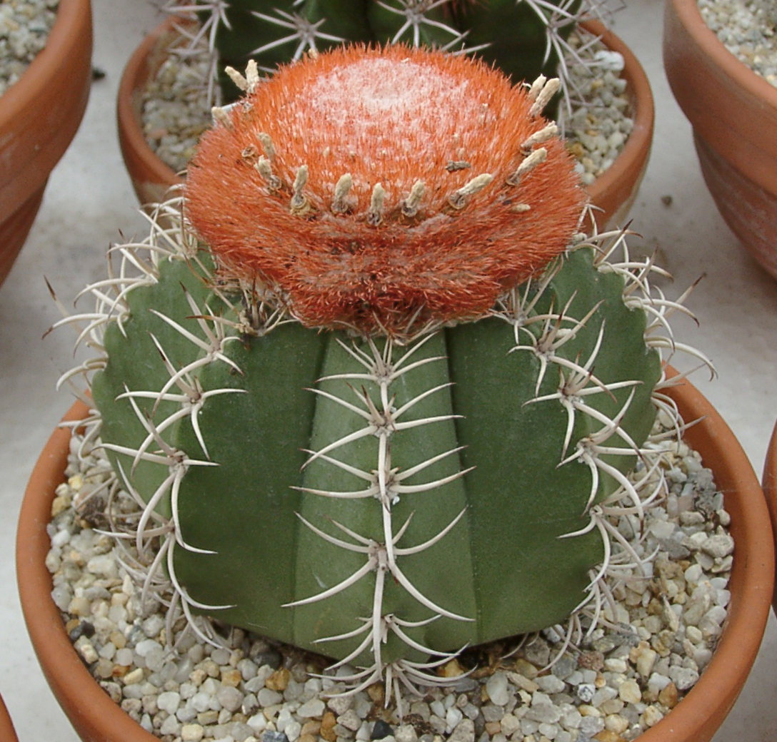 Melocactus matanzanus in der Kakteengärtnerei Piltz